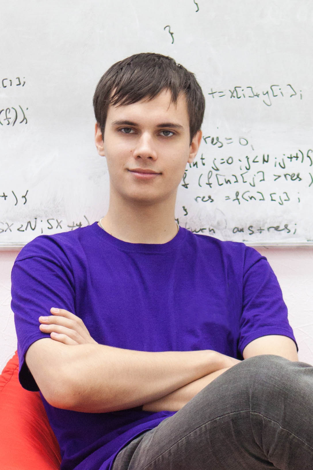 Студент Университета ИТМО Геннадий Короткевич